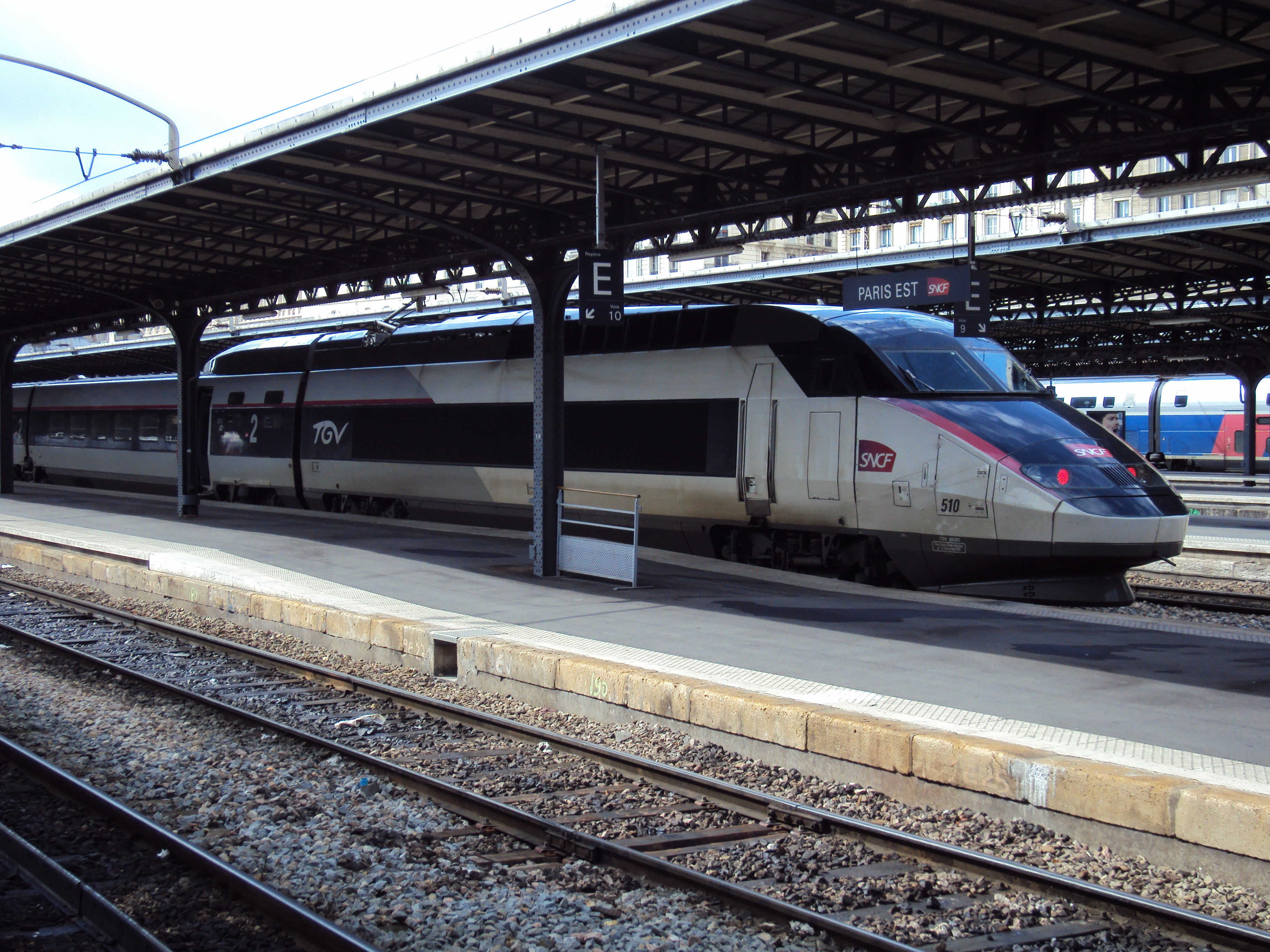 La rame réseau 510 à Gare de l'est dans sa nouvelle livrée